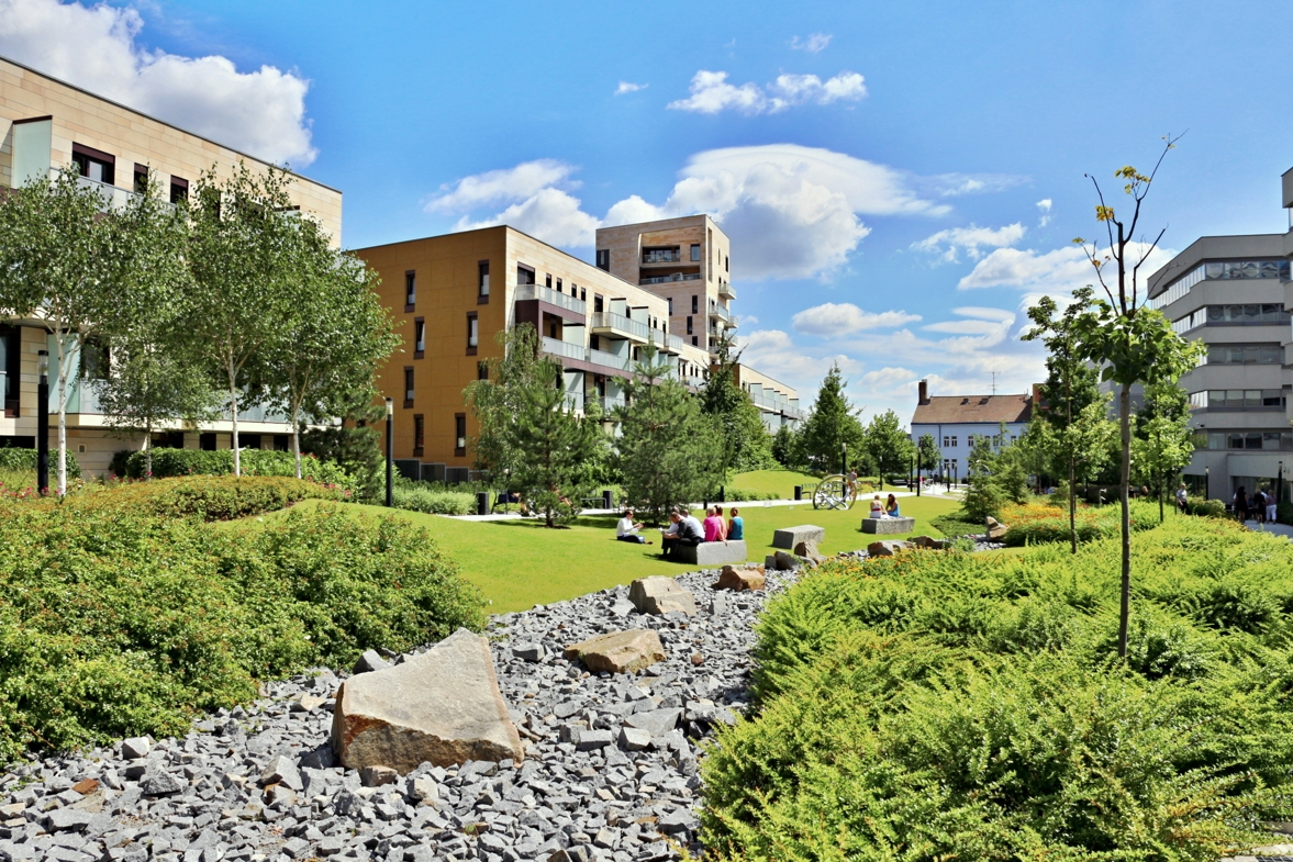 BB Centrum